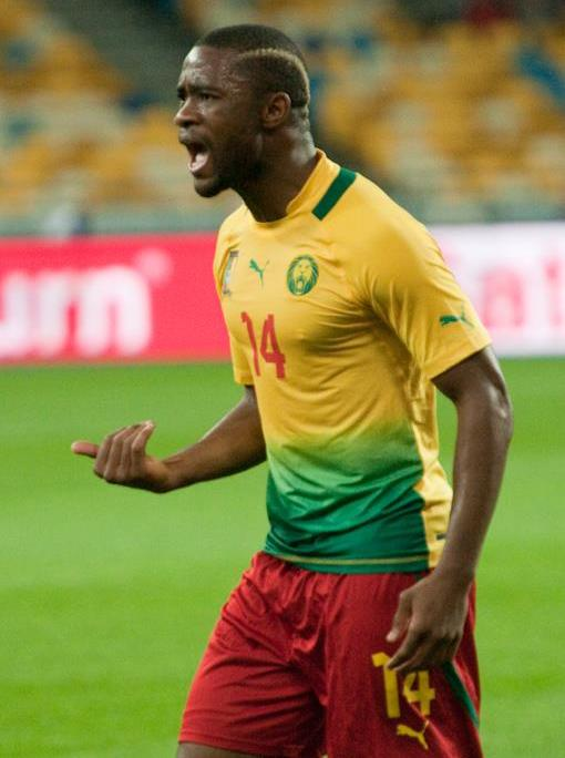 Орельєн Шеджу — камерунський футболіст, захисник